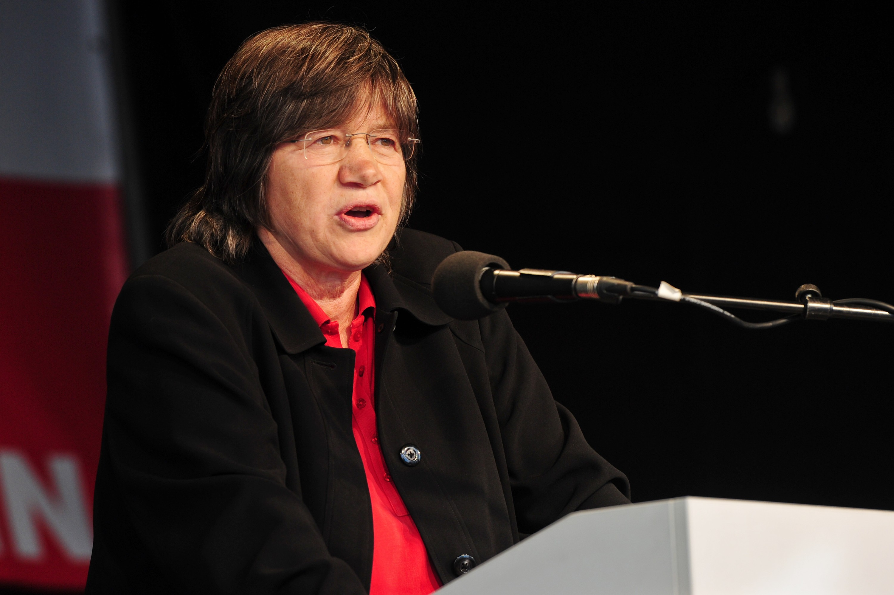 Rosemarie Will auf der Datenschutzdemonstration "Freiheit statt Angst"